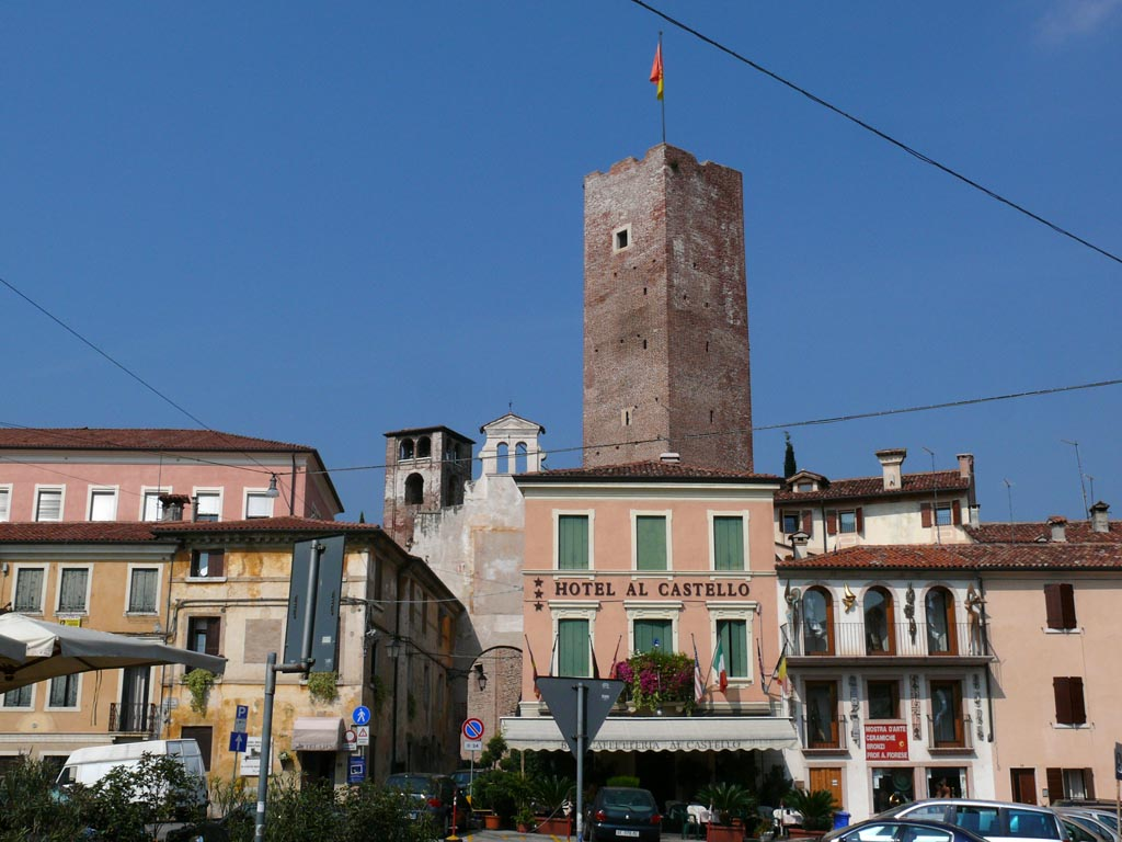 Bassano del Grappa, upper castel